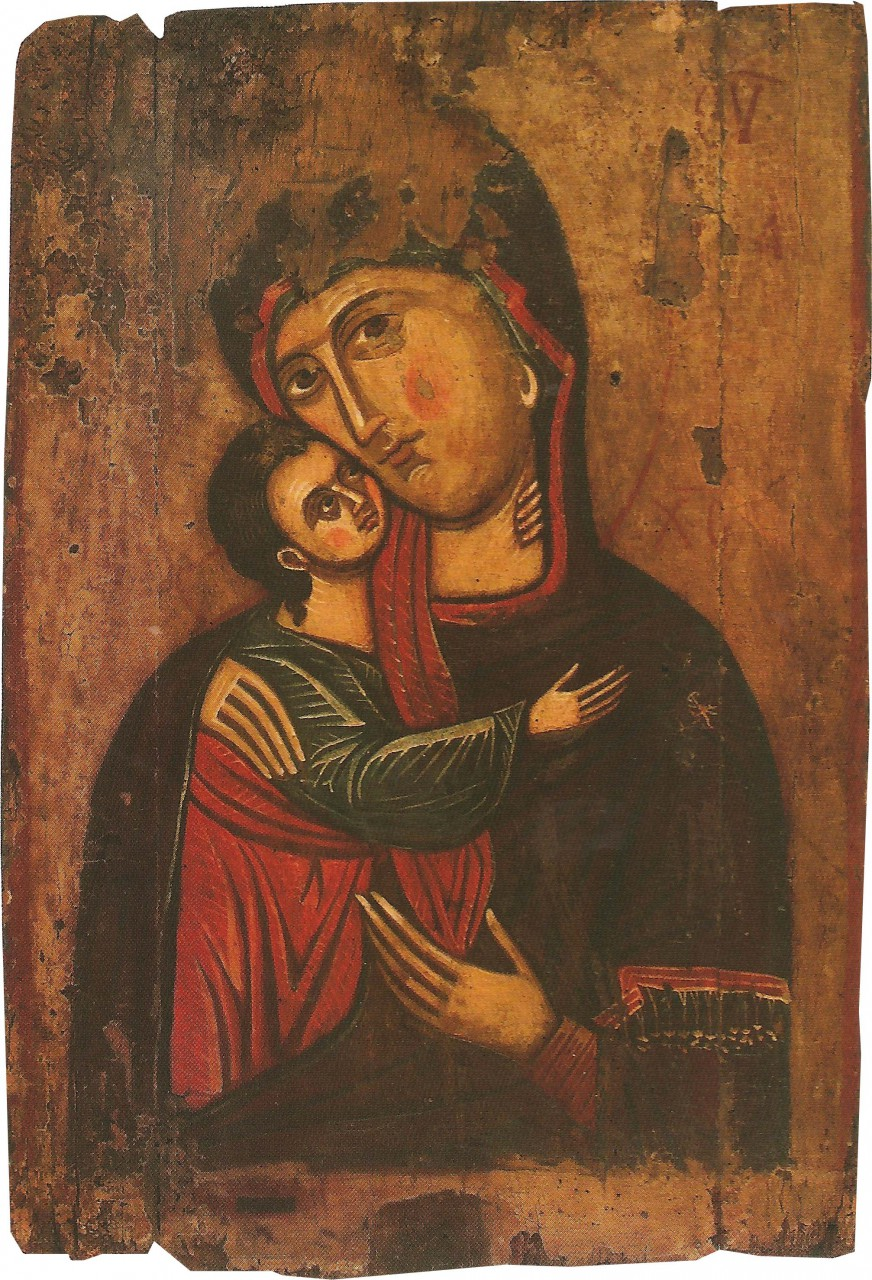 Αμφιπρόσωπη λιτανευτική εικόνα με την Παναγία Γλυκοφιλόυσα και την Παναγία Οδηγήτρια Β΄ μισό 14ου αι. Ιερός ναός Αγίου Προκοπίου